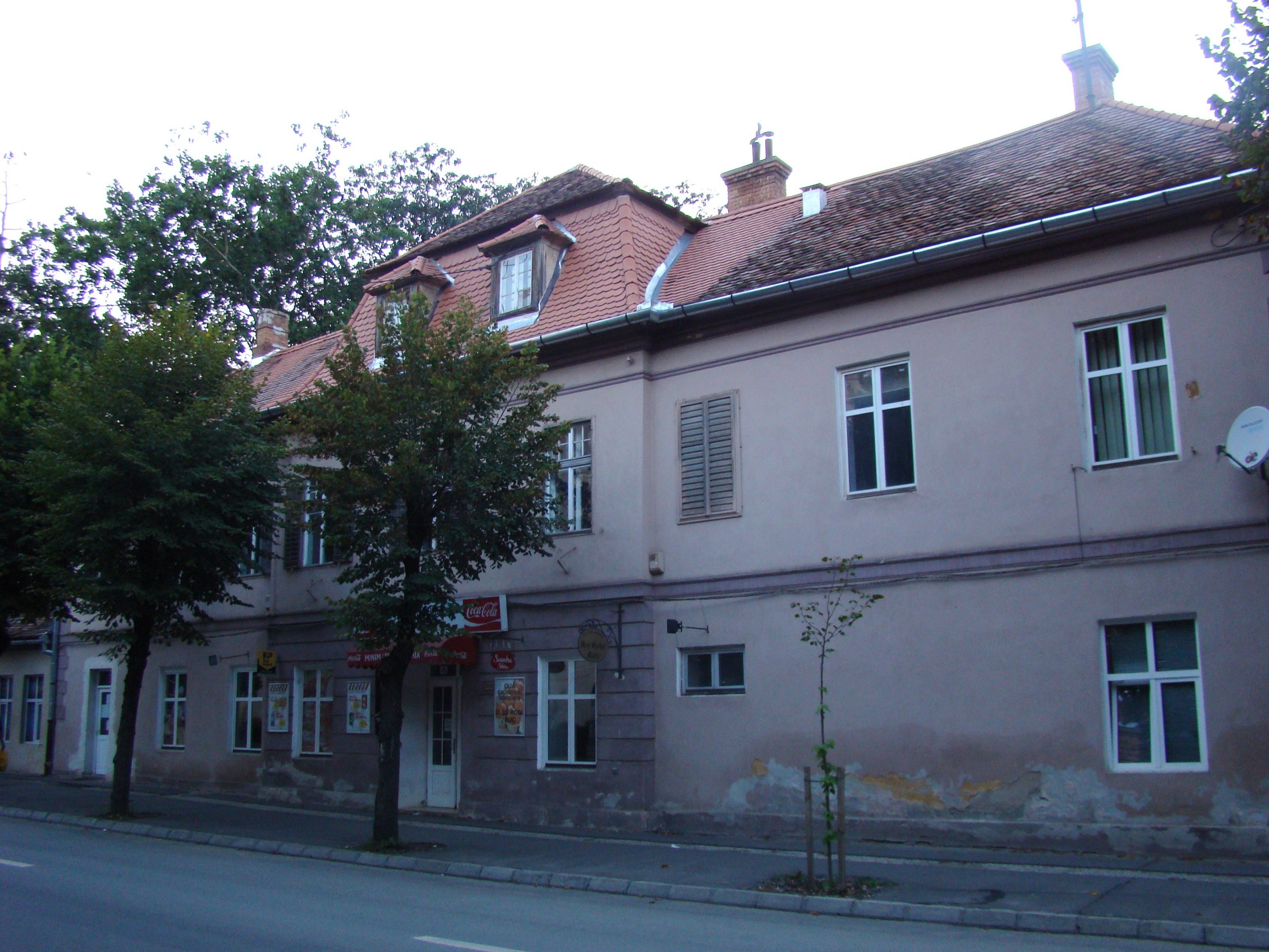 Ansamblul fostului seminar evanghelic din Sibiu (Corpul A) 01